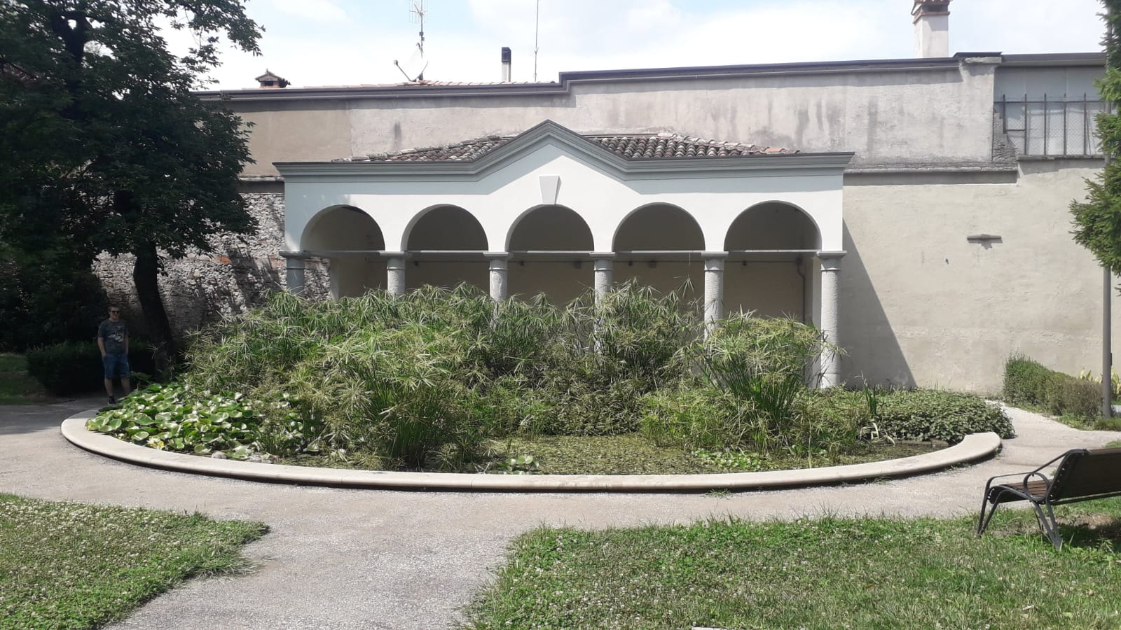 Stagno al giardino Del Torso (Udine)